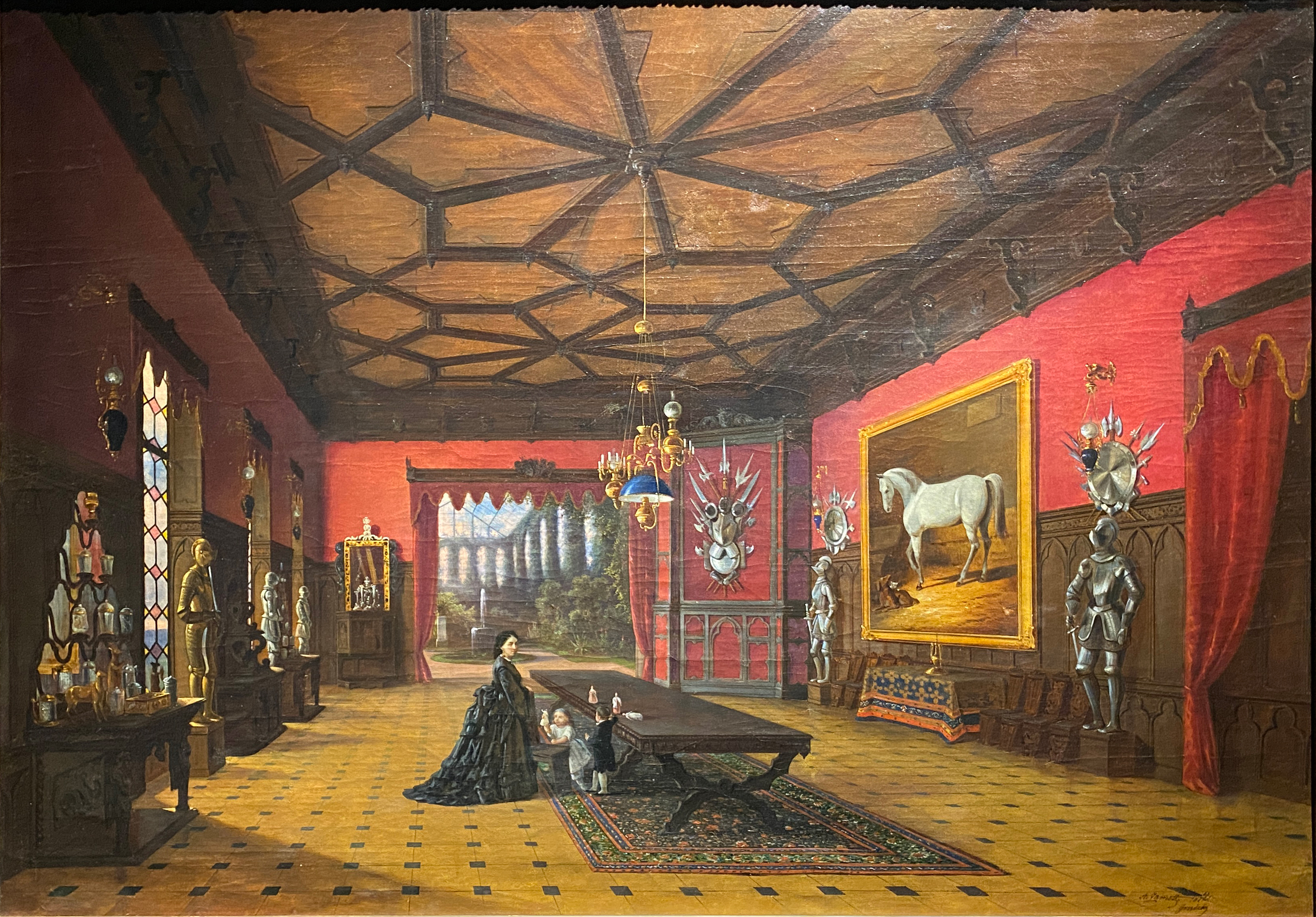 Беларуская (тарашкевіца): Астрашыцкі Гарадок (Astrašycki Haradok), інтэр'ер сядзібы Тышкевічаў (Tyškievič)